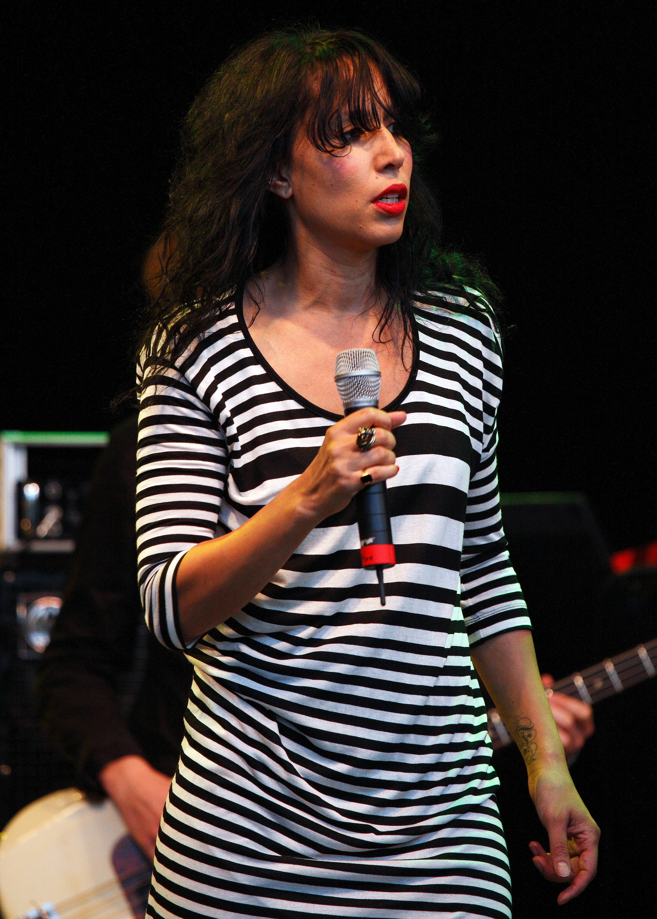 Titiyo performing at Stadsfesten i Skellefte.